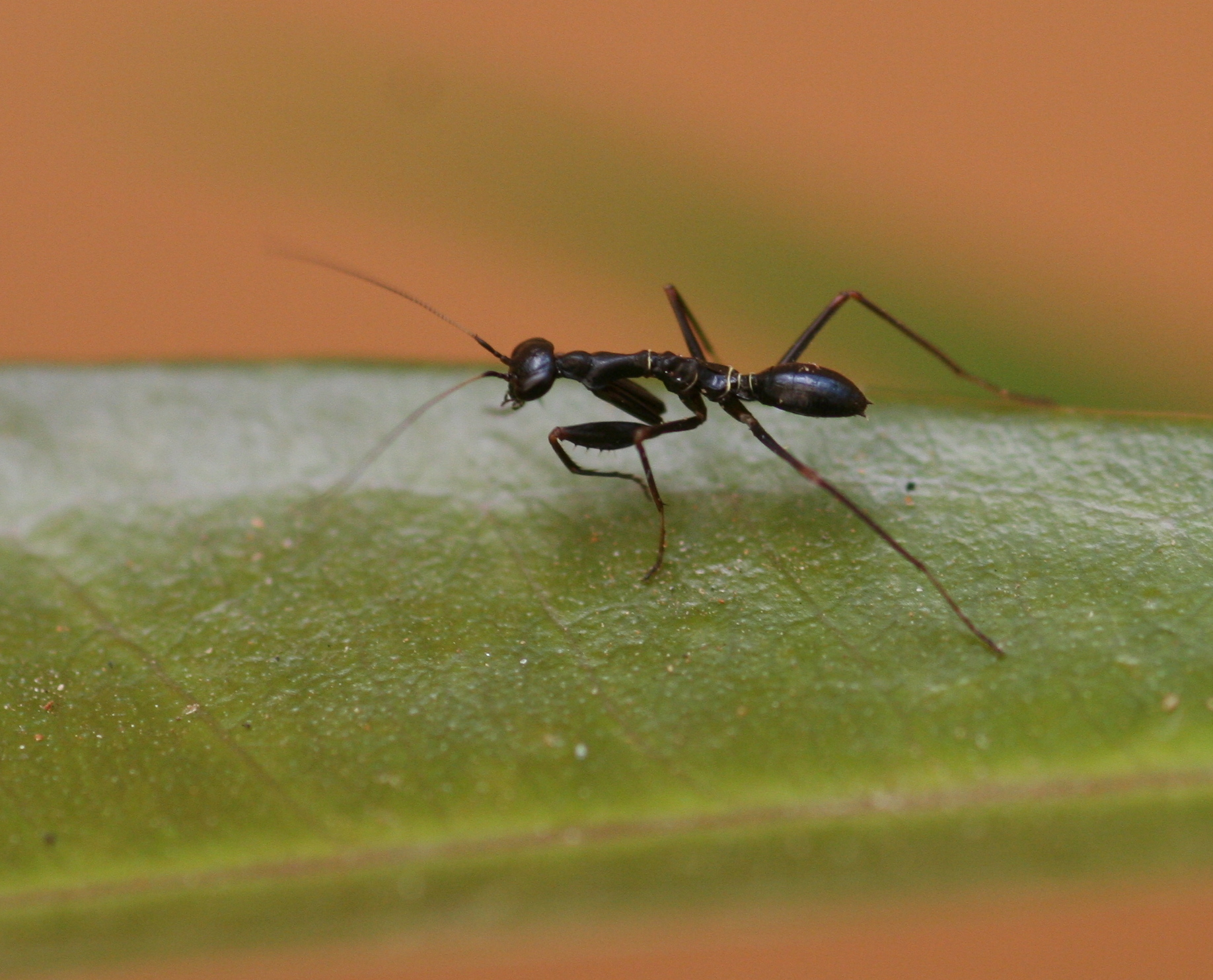 Immature mantis , Bangalore, India